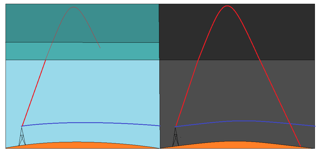 verschil tussen voortplanten dag en nacht van LF en MF radio signalen